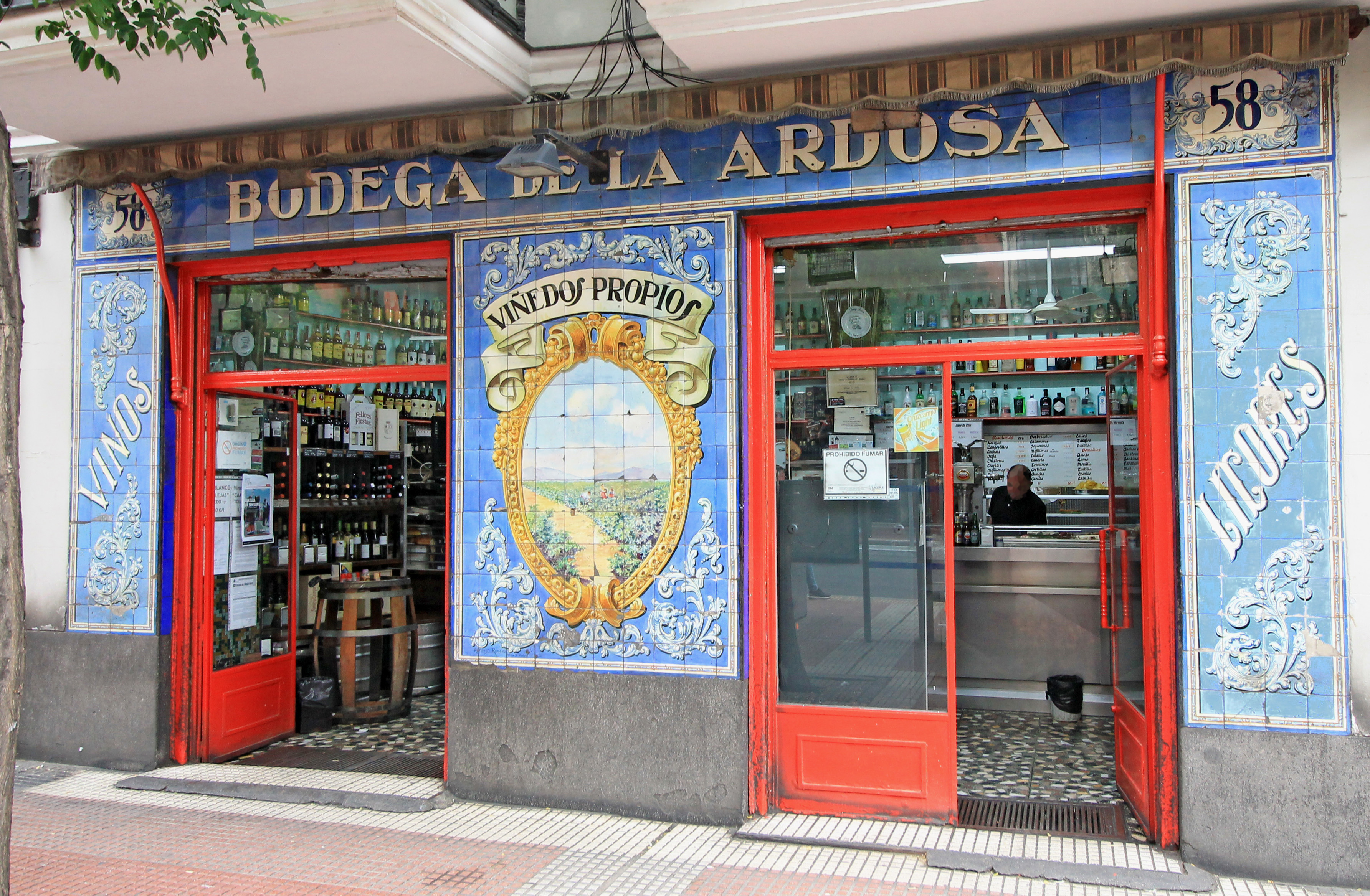 Façade of Bodega de La Ardosa tavern.